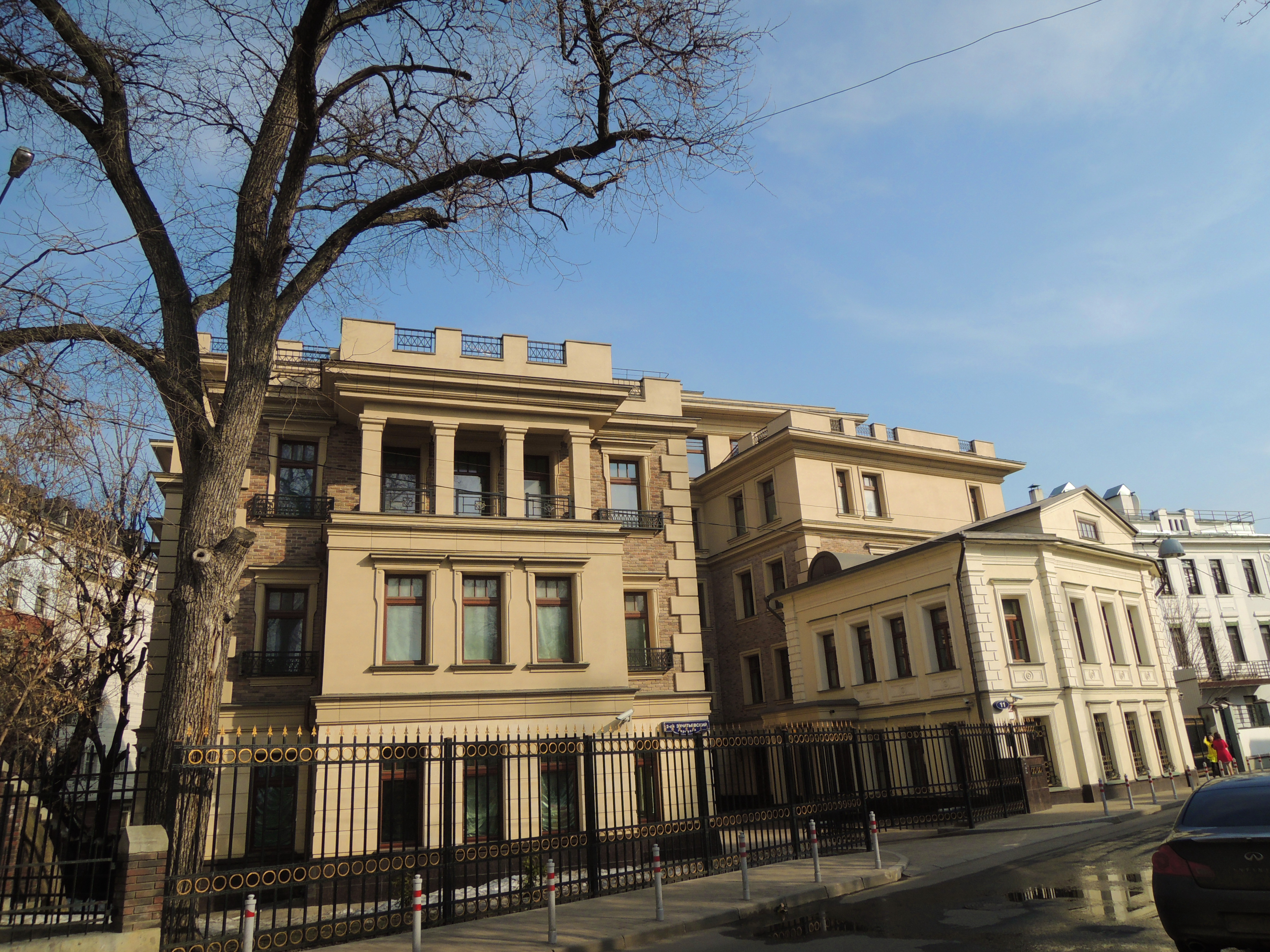 2-й Зачатьевский пер., 13